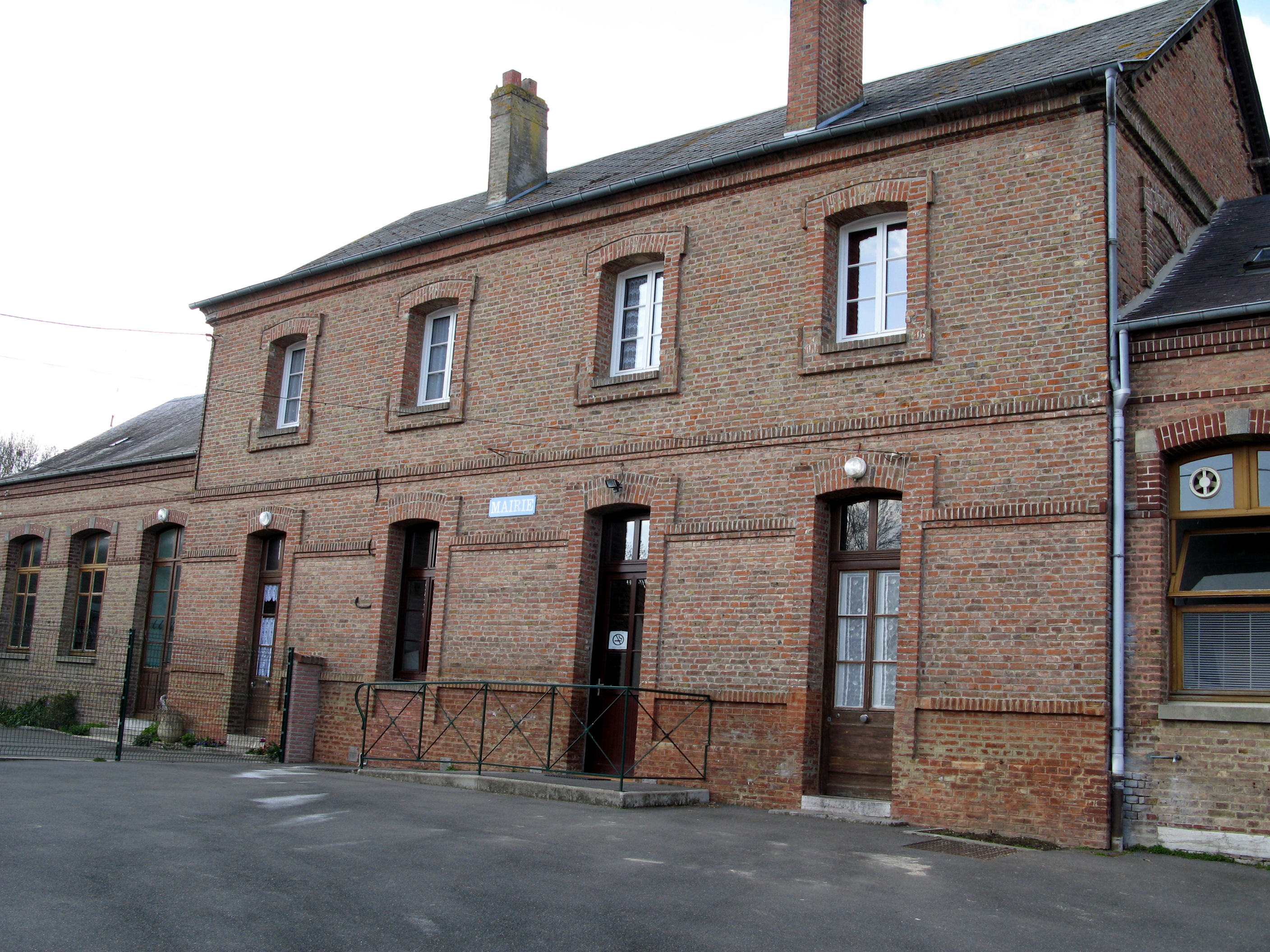 Franleu (Somme, France) - La mairie est non loin de l'église, entre les deux classes primaires et les anciens logements de fonction des instituteurs, aujourd'hui logements locatifs. Ses murs portent la trace des combats livrés fin mai 1940, à l'arrivée des troupes allemandes.